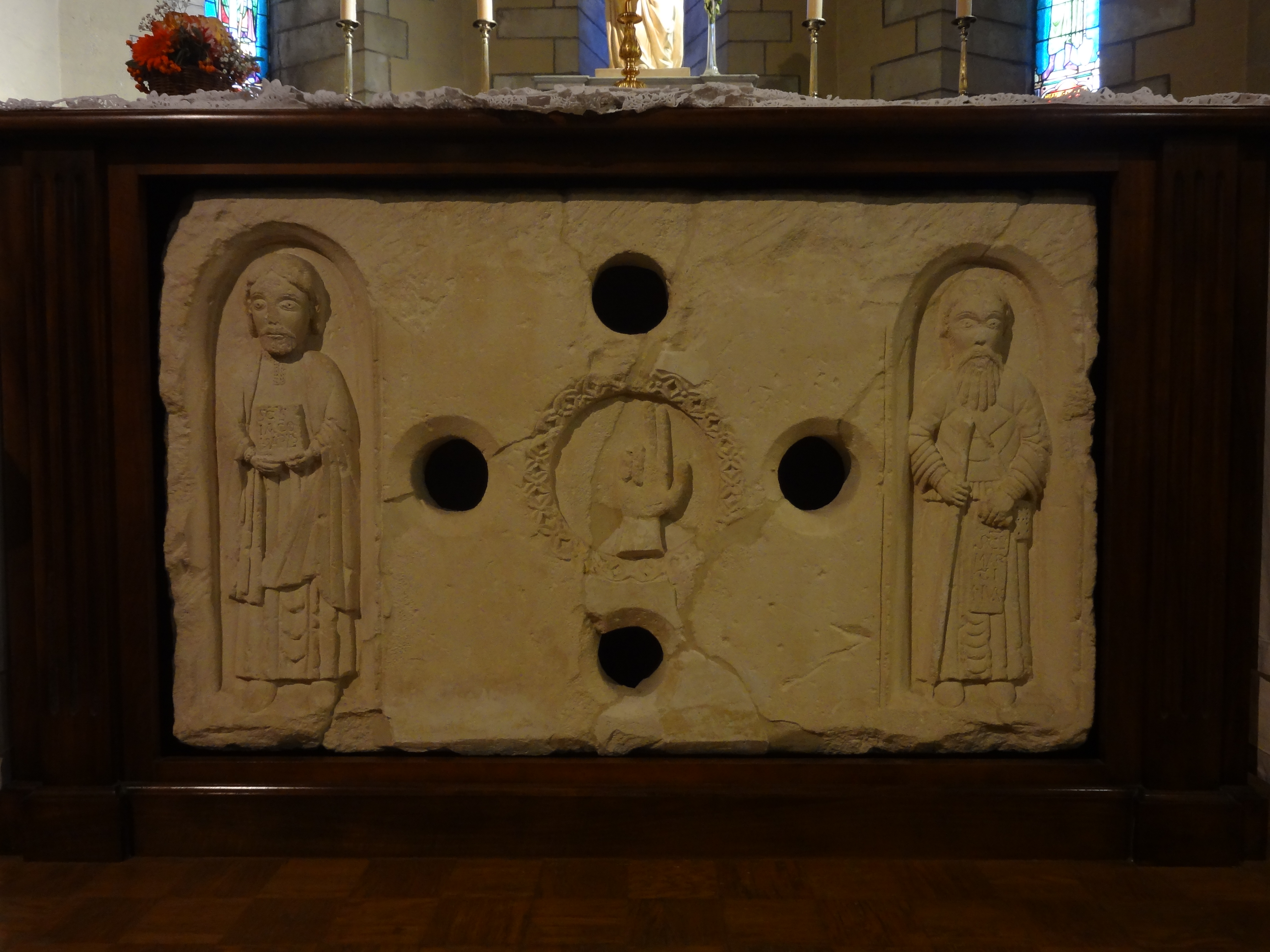 Devant d’autel sculpté, représentant saint Jacques et saint Martin, encadrant la main de Dieu bénissant